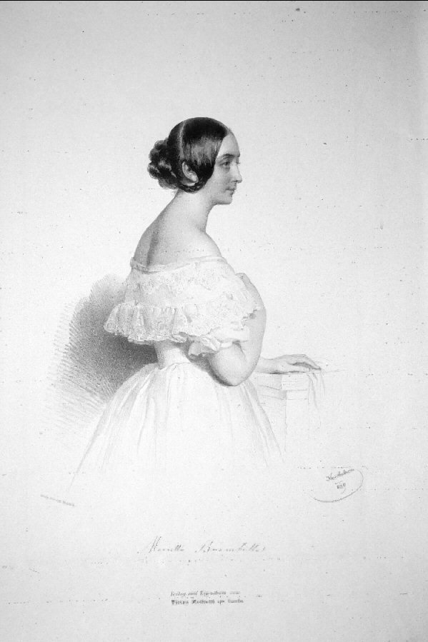 Marietta Brambilla (1807-1875), italienische Opernsängerin (Mezzosopran) Lithographie von Josef Kriehuber, 1839